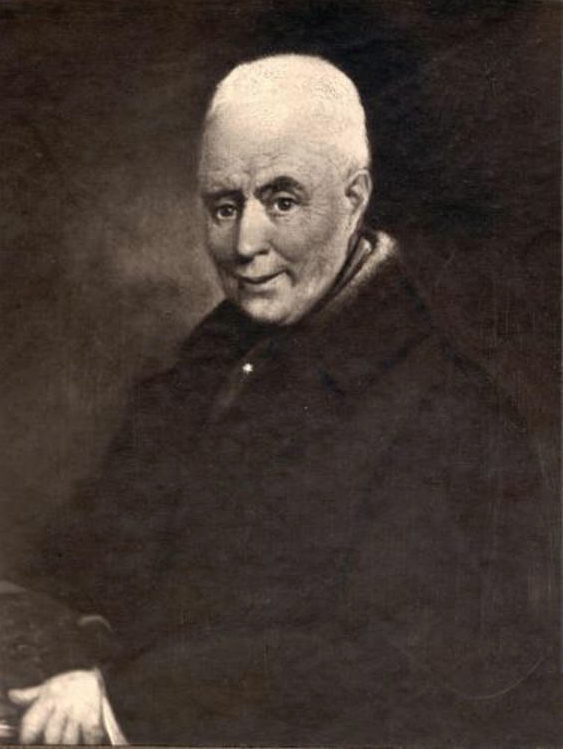 Portret van Valerius Lodewijk Vegilin van Claerbergen (1774-1844) op 63-jarige leeftijd